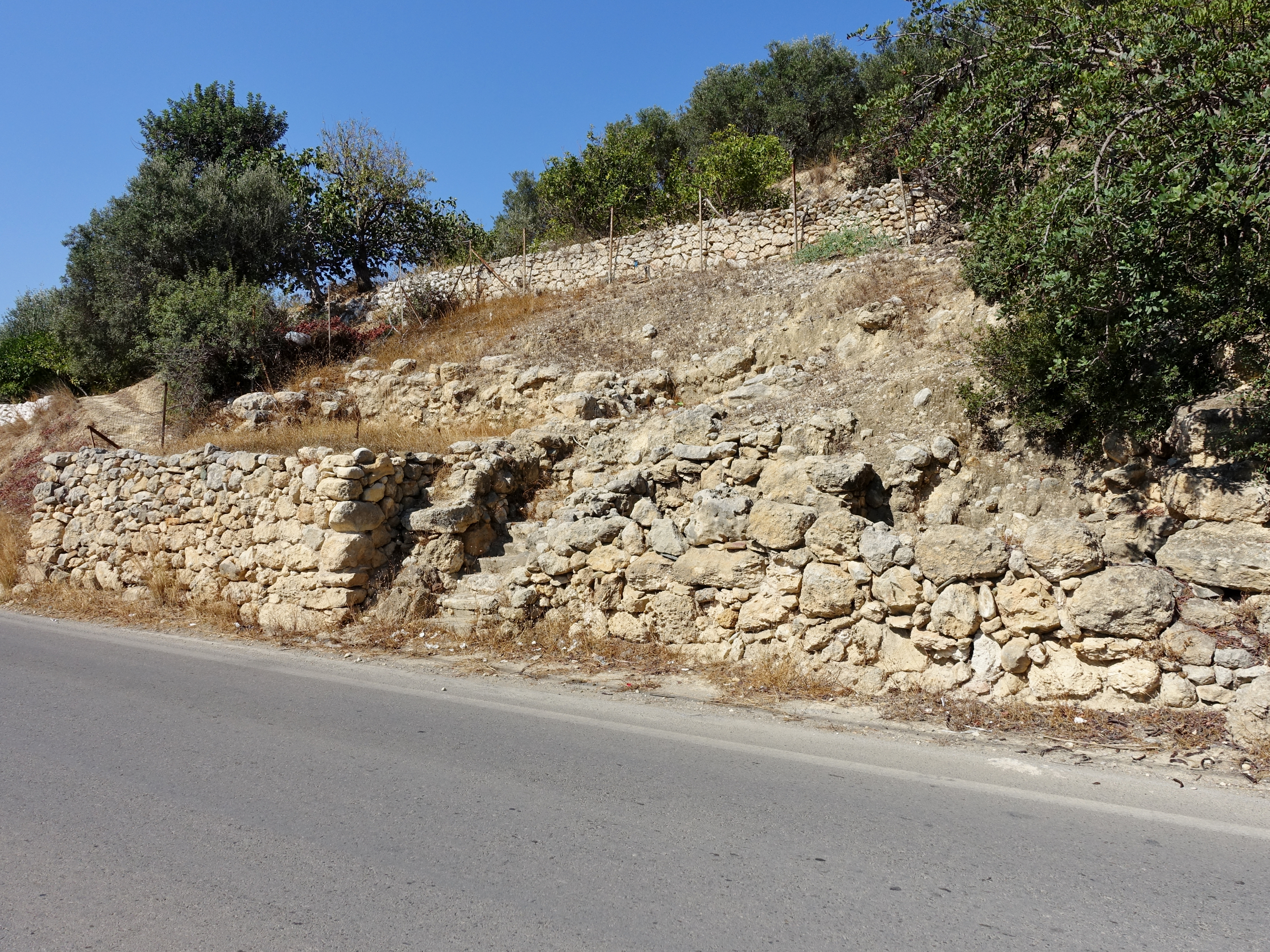 Minoische Villa von Klimataria, Gemeinde Sitia, Kreta, Griechenland